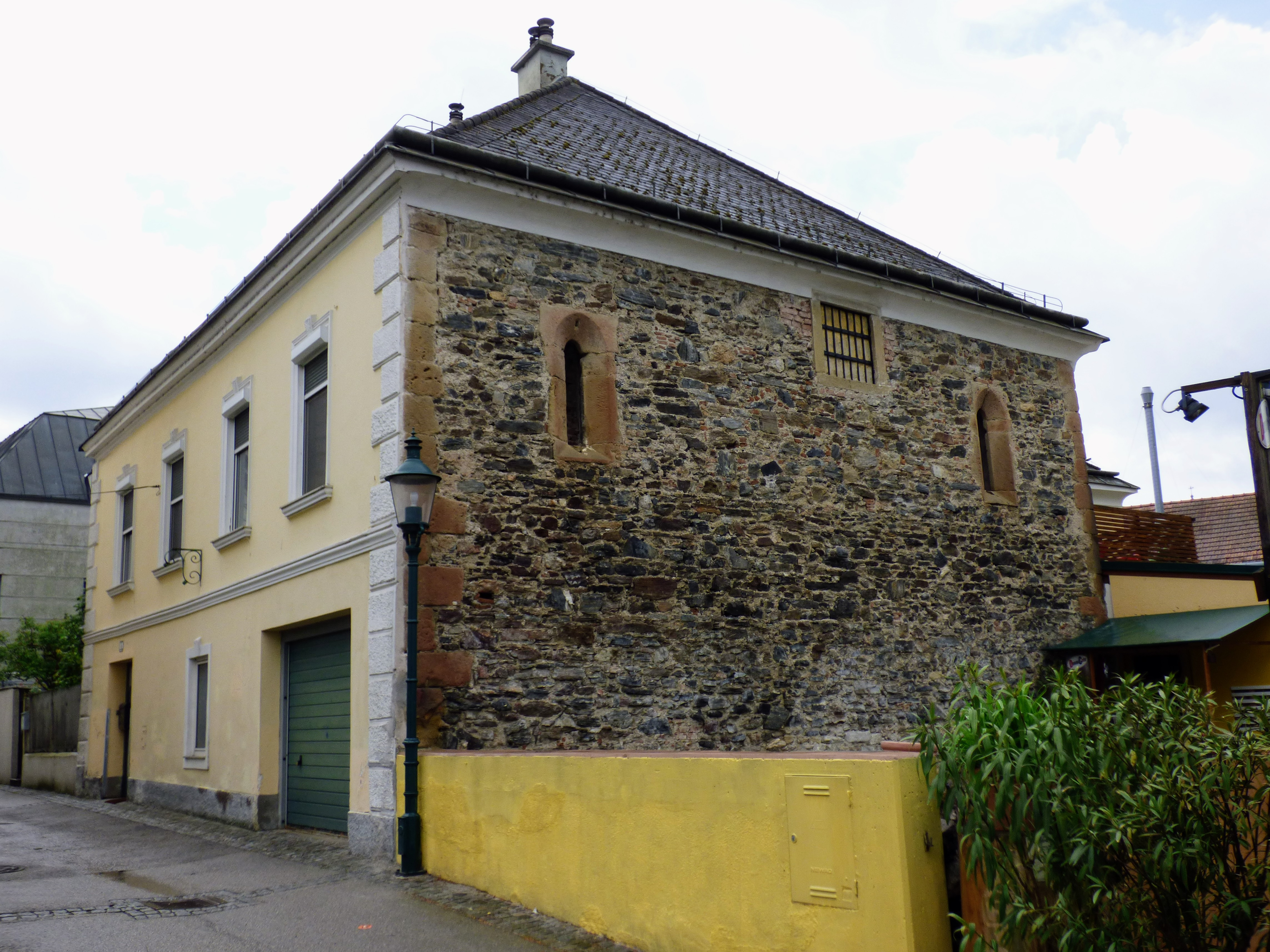 Haus Fischergasse 5, Tulln. Nordwand mit vermauerten gotischen Fenstern. Vermutlich ursprünglich Jüdische Synagoge, später Gerichtsgebäude, dann im 19. Jahrhundert umgebaut und heute Privathaus.